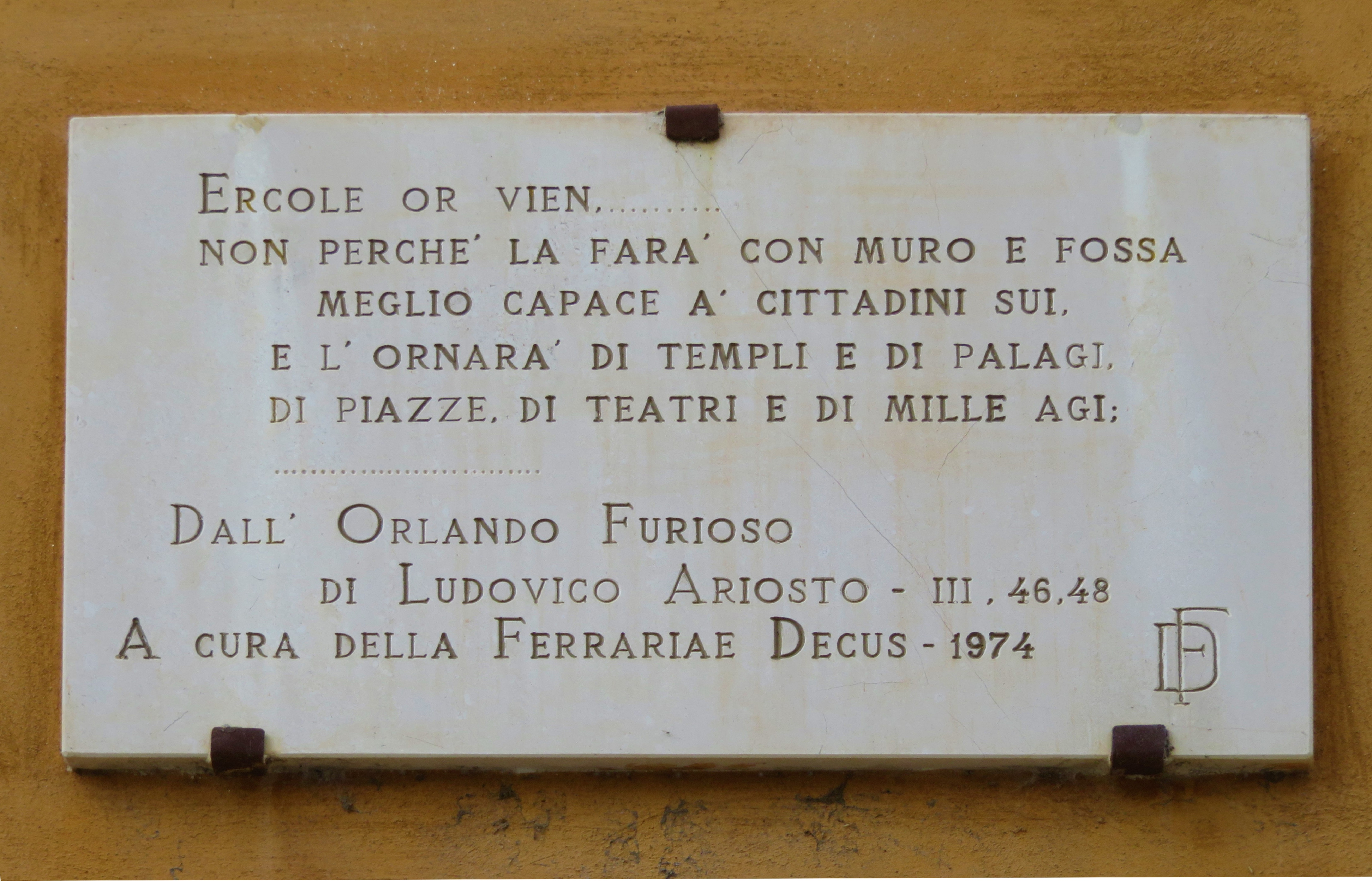 Lapide che ricorda Ercole I d'Este. Testo: ERCOLE OR VIEN . . . . . . . . . . . NON PERCHE' LA FARA' CON MURO E FOSSA MEGLIO CAPACE A' CITTADINI SUI. E L'ORNARA' DI TEMPLI E DI PALAGI, DI PIAZZE, DI TEATRI E DI MILLE AGI: . . . . . . . . . . . . . . . . . . . DALL'ORLANDO FURIOSO DI LUDOVICO ARIOSTO - III, 46,48 A CURA DELLA FERRARIAE DECUS - 1974